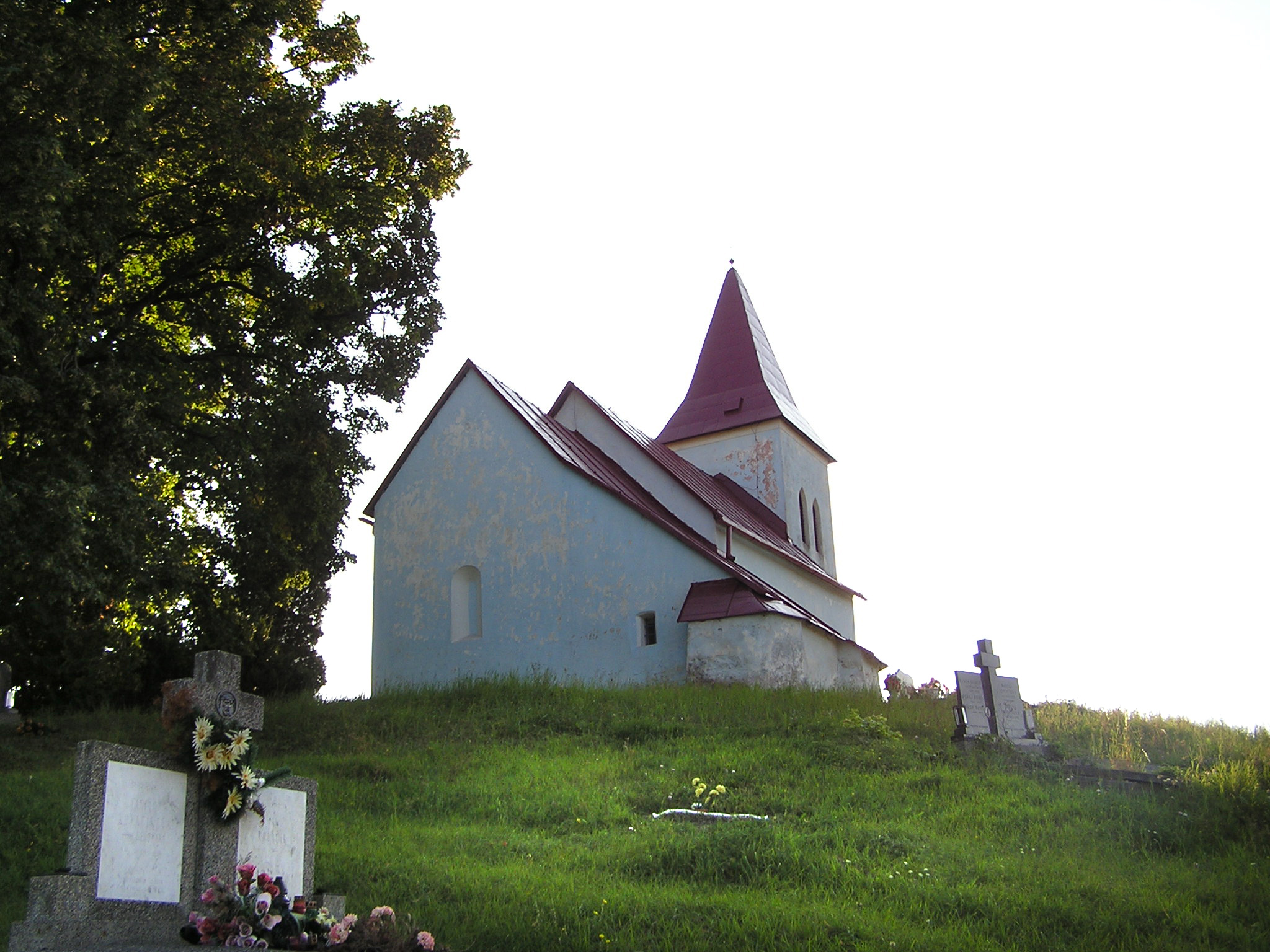 Kostol svätých Kozmu a Damiána v obci Abramová (okr. Turčianske Teplice), región Turiec.